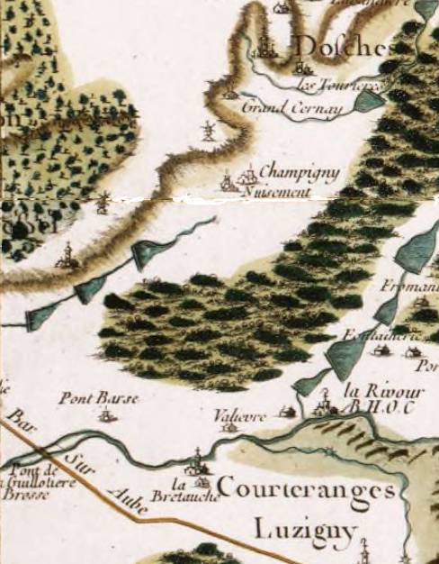 cf. le tittre